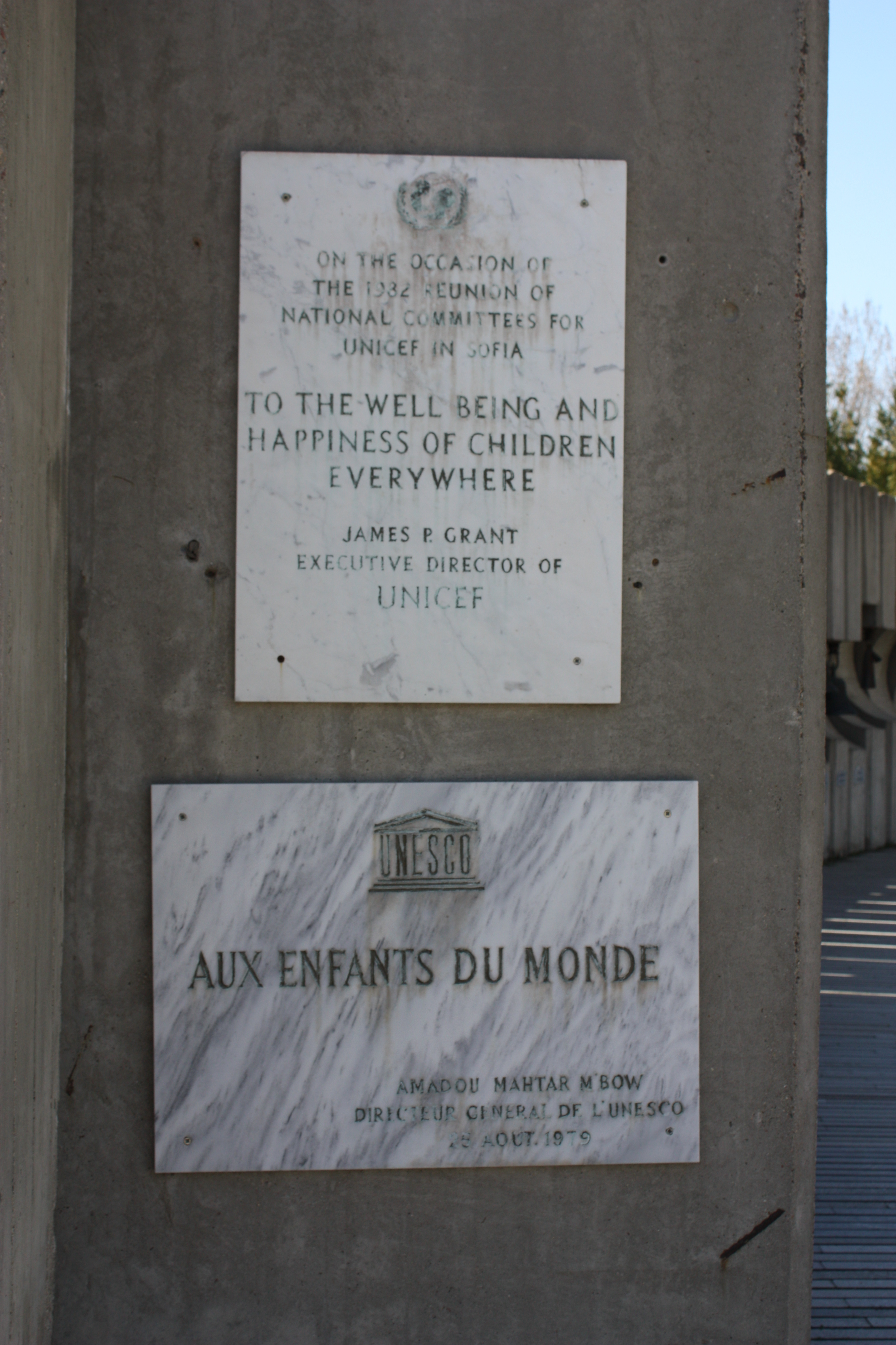 The bells, Die Glocken, Kambanite, Sofia, Bulgaria, Камбаните, София